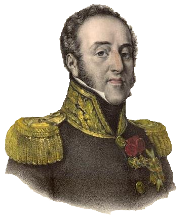 Portrait of Louis Gabriel Suchet